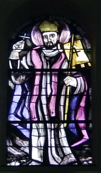 eines der 32 Kirchenfenster der Pfarrkirche Liesing (Wien 23) von Martin Häusle. selbst fotografiert im März 2007